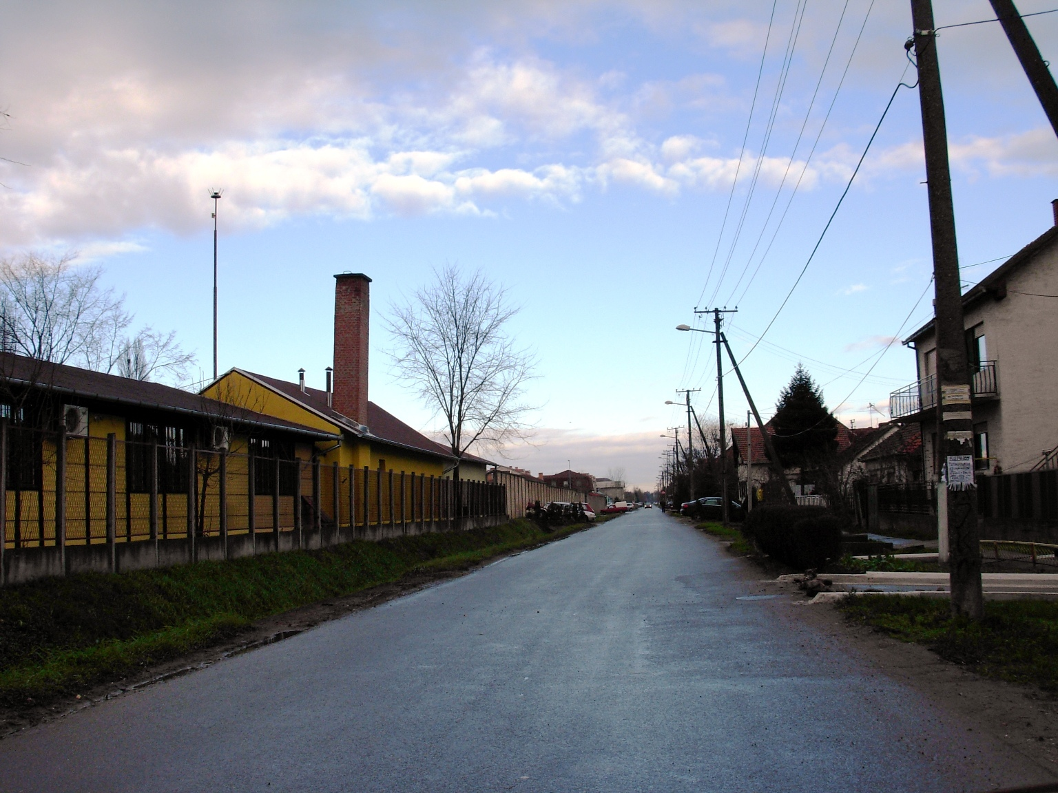 Ulica Klisanski put na Klisi / Slanoj Bari. Novi Sad.